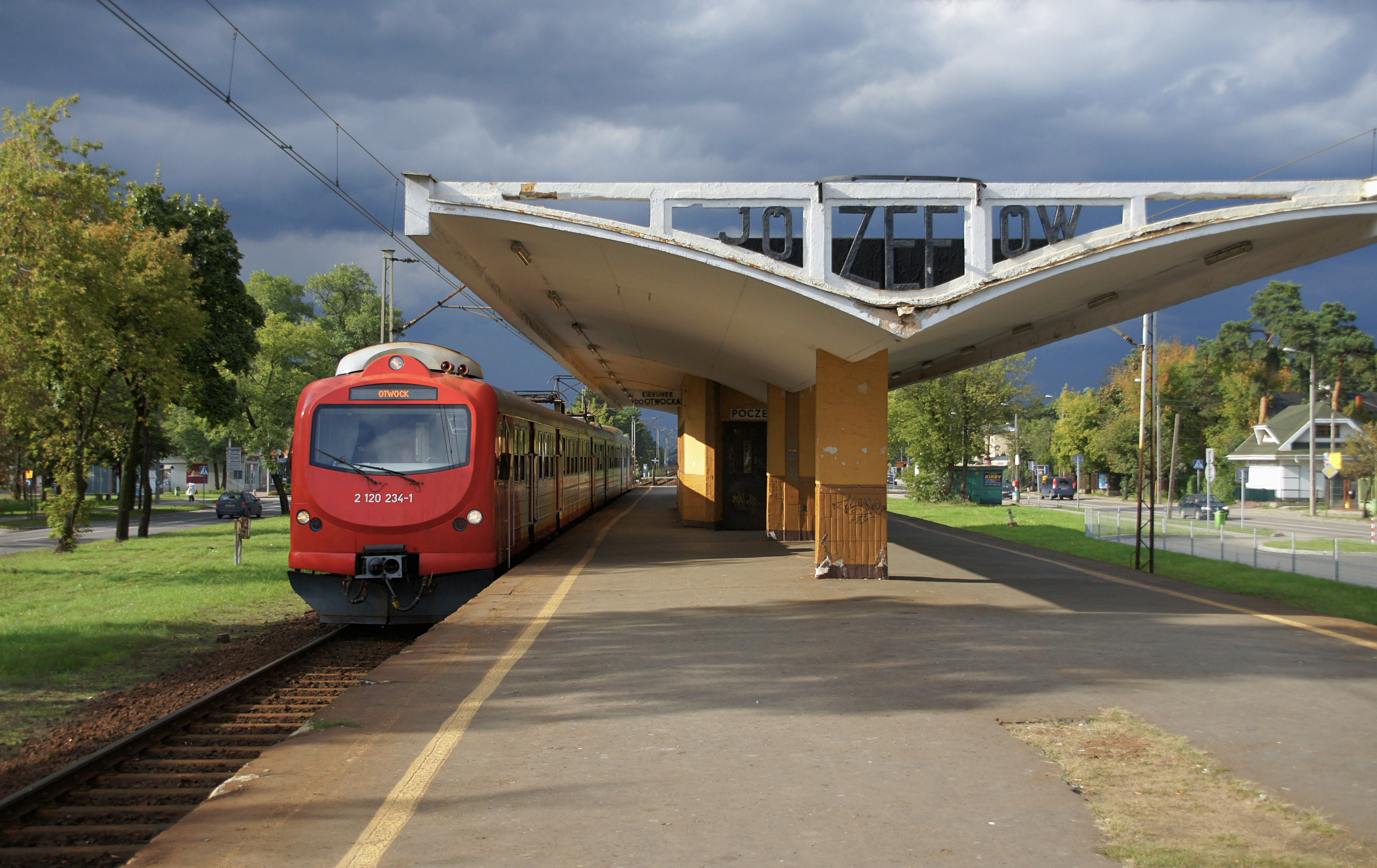 Stacja PKP Józefów - widok od południa. Na stacje wjeżdża właśnie pociąg SKM Warszawa linii S1 w stronę Otwocka.